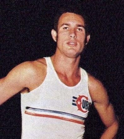 Alberto Juantorena (1976), 'Montreal 76', Panini figurina.